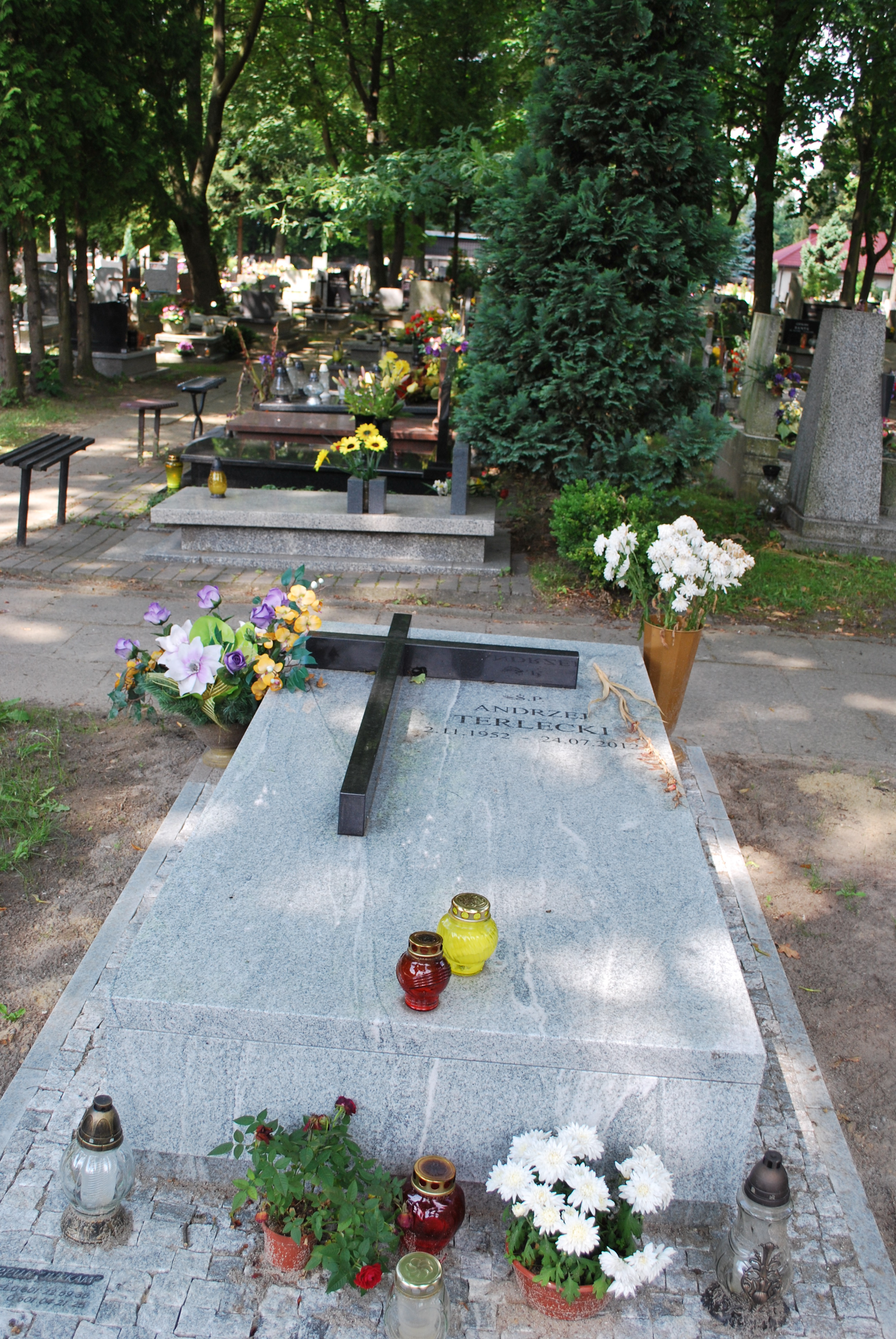 Nagrobek posła Andrzeja Terleckiego